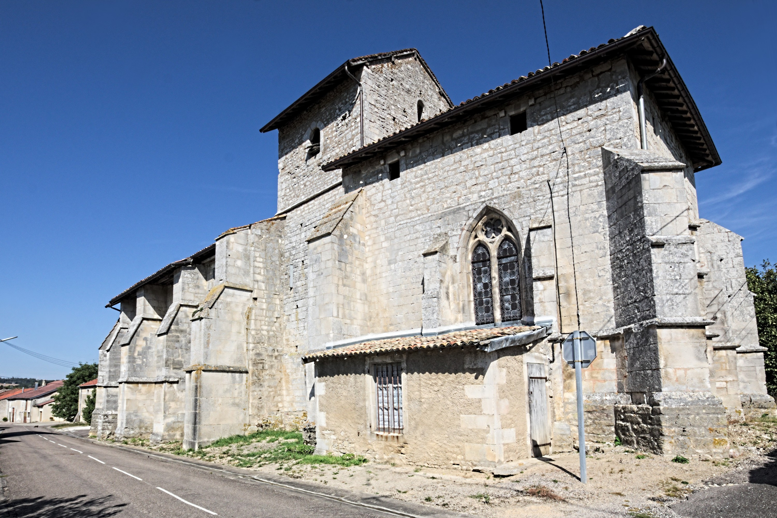 Église de Sepvigny, datant du XIIIe siècle, fortifiée au XVe siècle